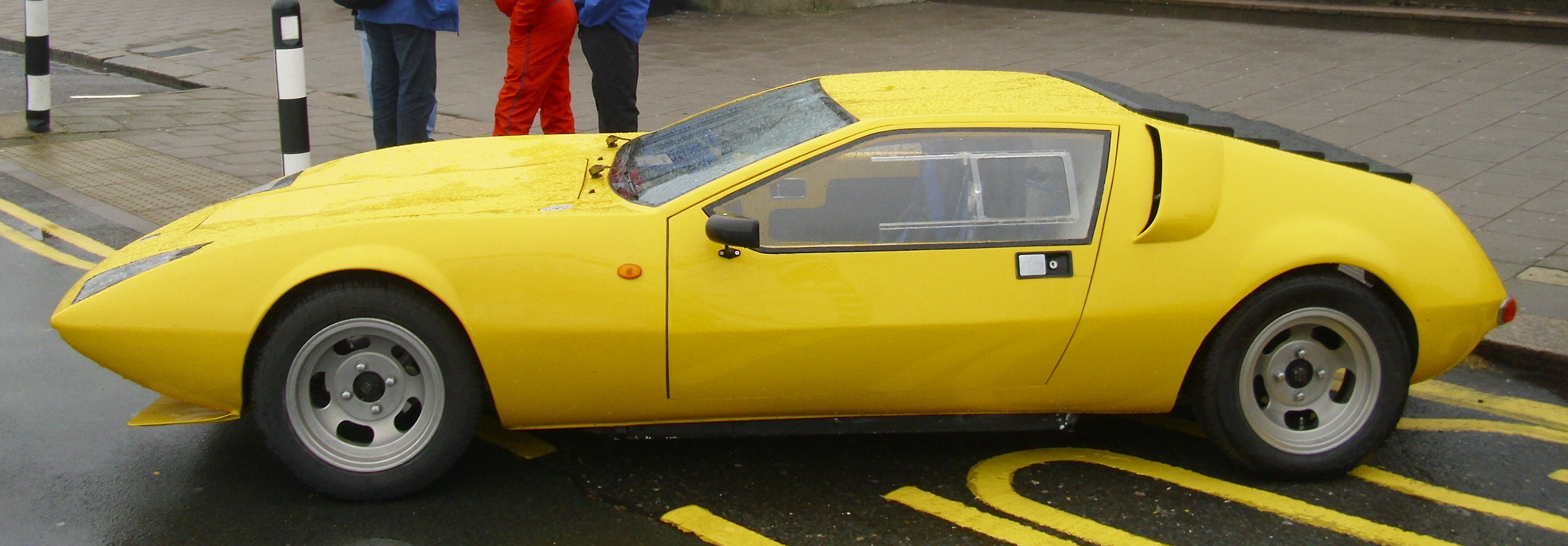 Gilbern T 11 1970